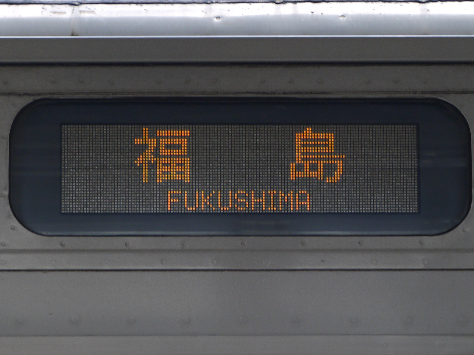 JR東日本 719系電車 LED式側面行先表示器(0番台)